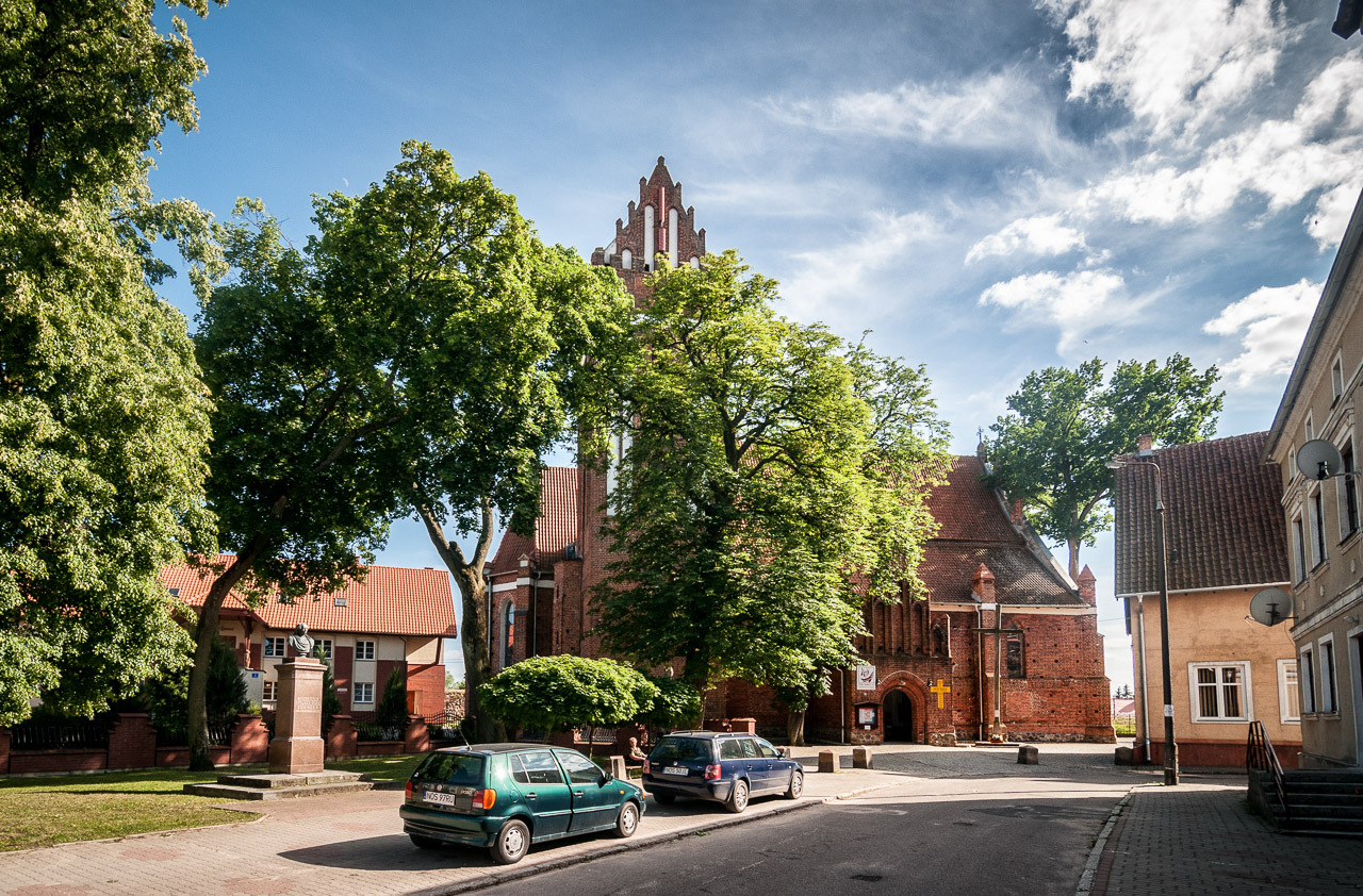 Kościół w Morągu.